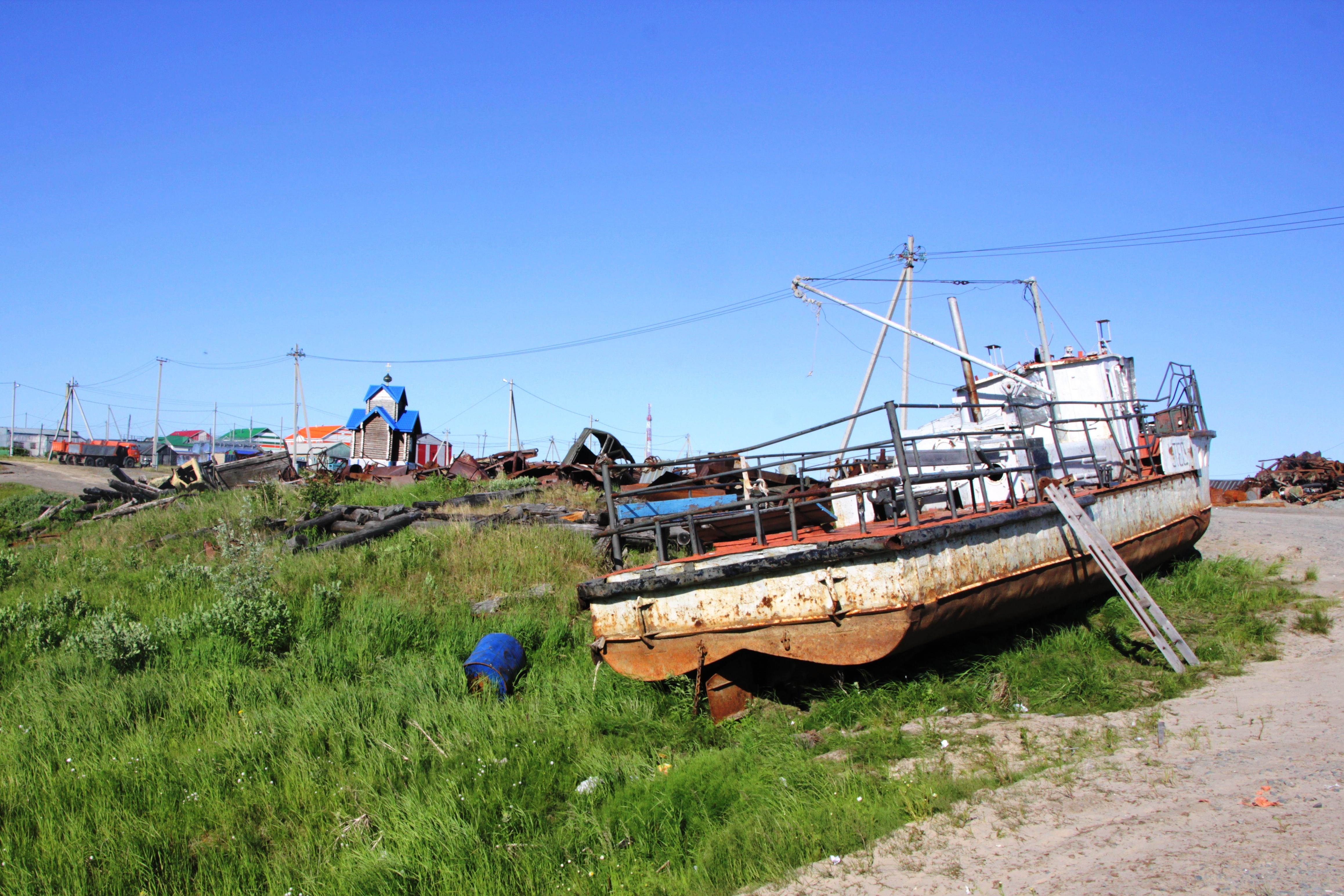 Blick in den Hafen von Nowy Port, Nordsibirien, von der Wasserseite aus. Im Hintergrund Teile der Siedlung.